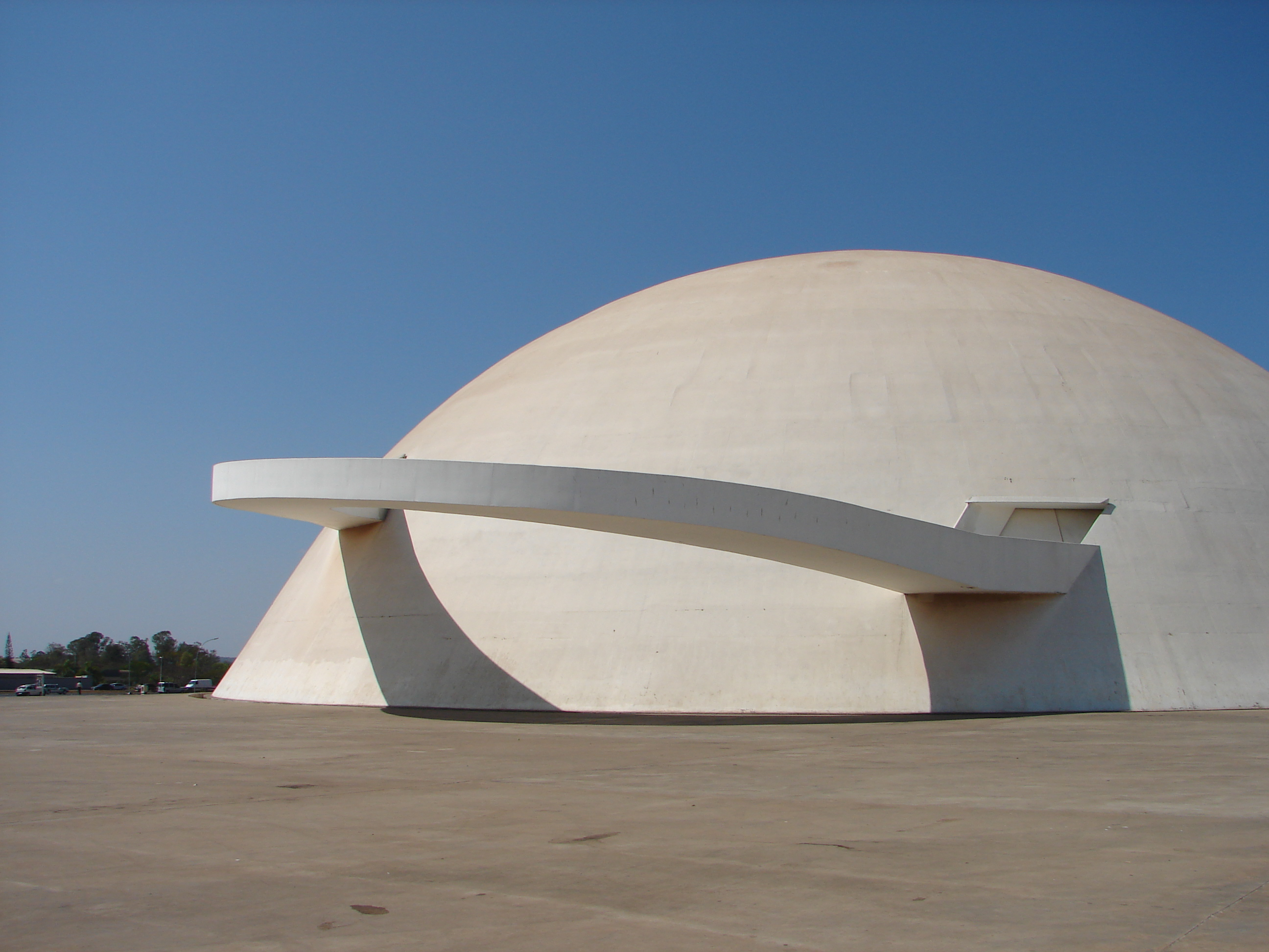 Template:EnMuseu Nacional Honestino Guimarães.